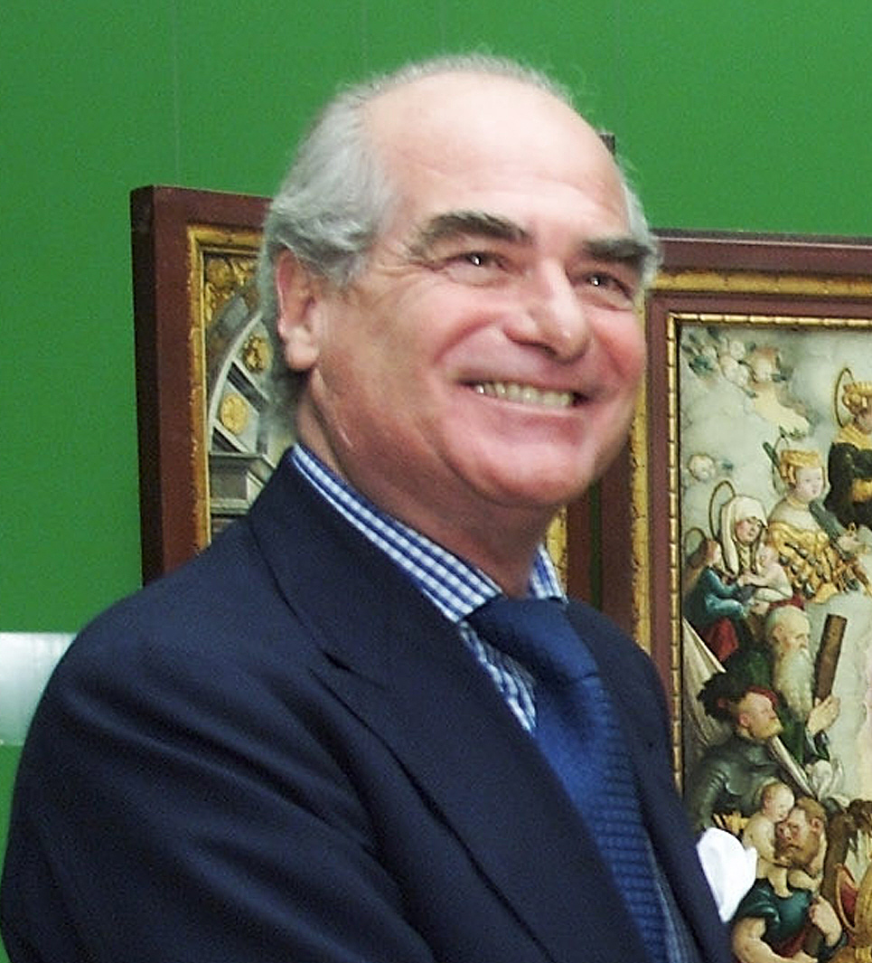 Heinrich Fürst zu Fürstenberg; Detail aus: Christian von Holst und Heinrich Fürst zu Fürstenberg in der Staatsgalerie Stuttgart vor dem Wildensteiner Altar des Meisters von Meßkirch aus den Fürstlich Fürstenbergischen Sammlungen, Donaueschingen